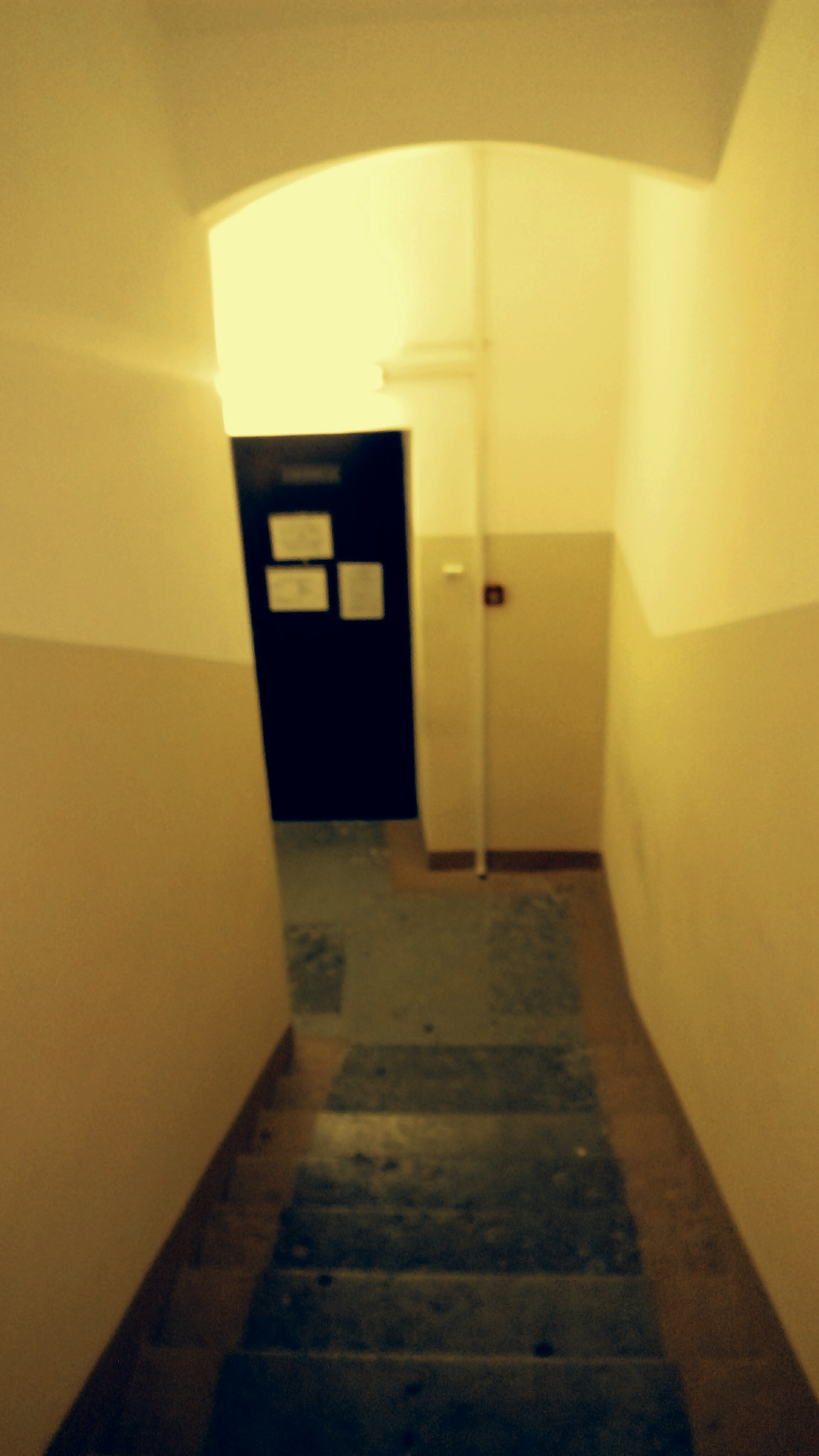 Лестница в Психиатрической клинике святого Николая на Пряжке (Санкт-Петербург)